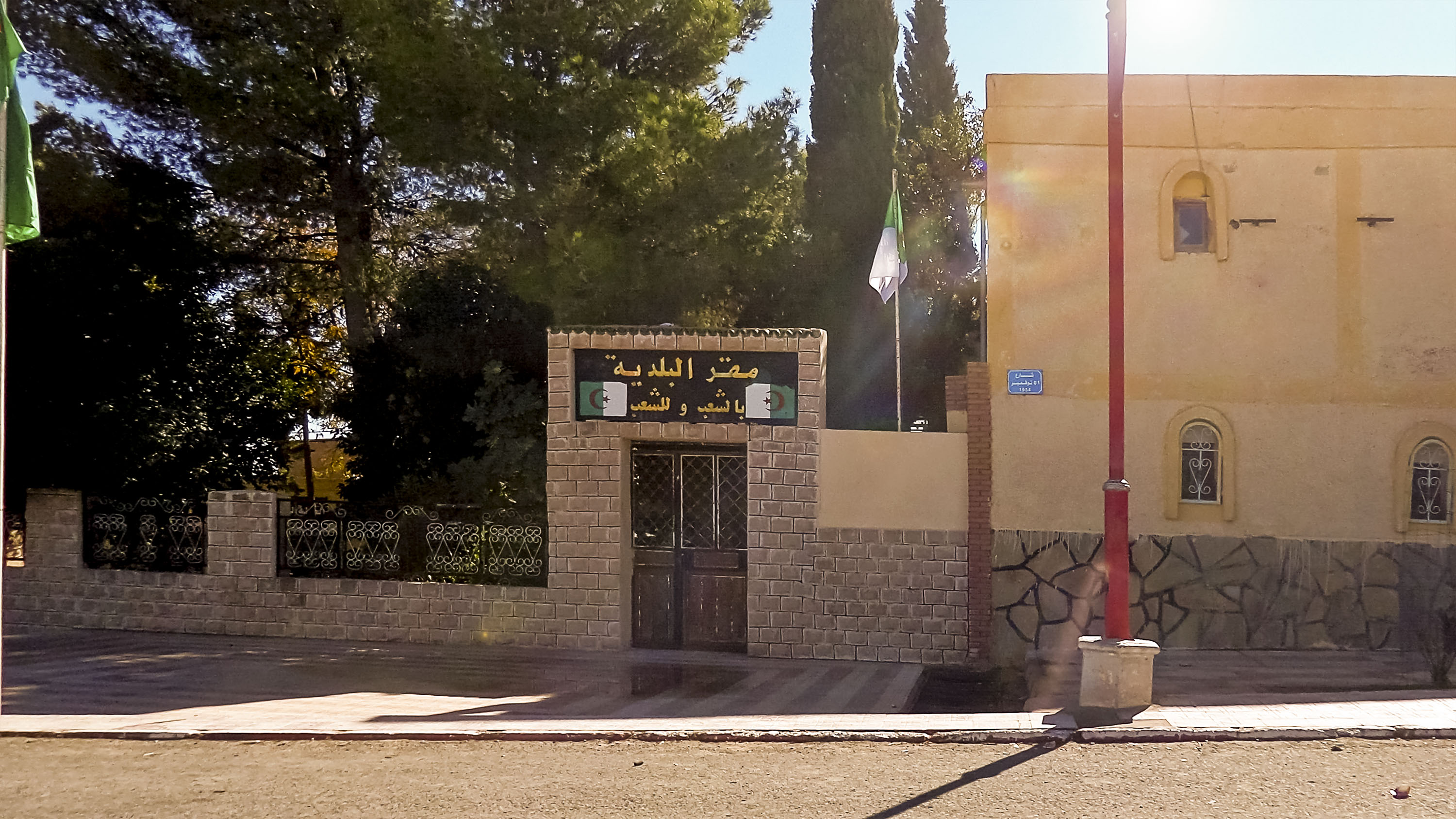 Sidi Bouzid, wilaya de Laghouat سيدي بوزيد، ولاية الاغواط